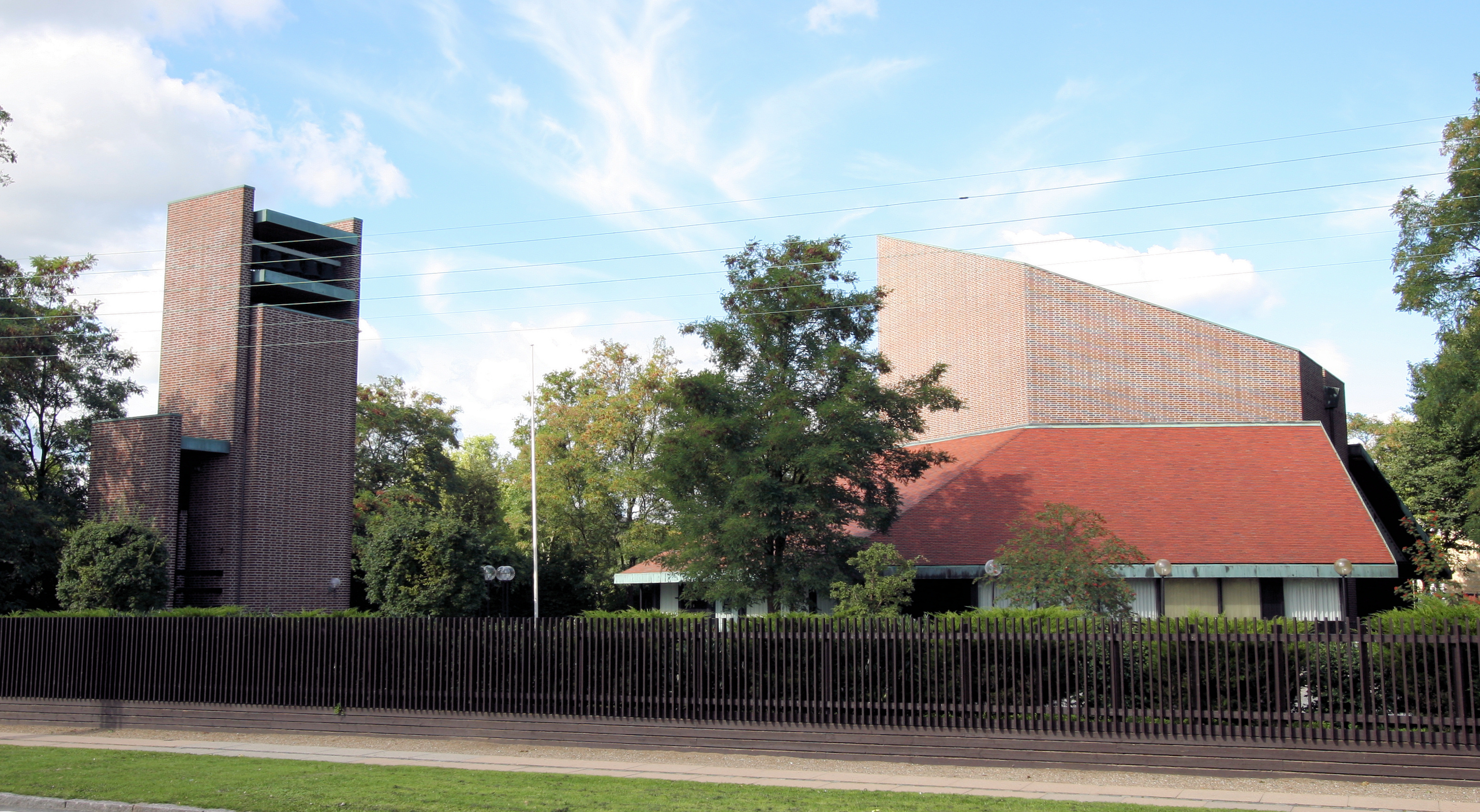 Margrethekirken in Copenhagen, Denmark. Exterior